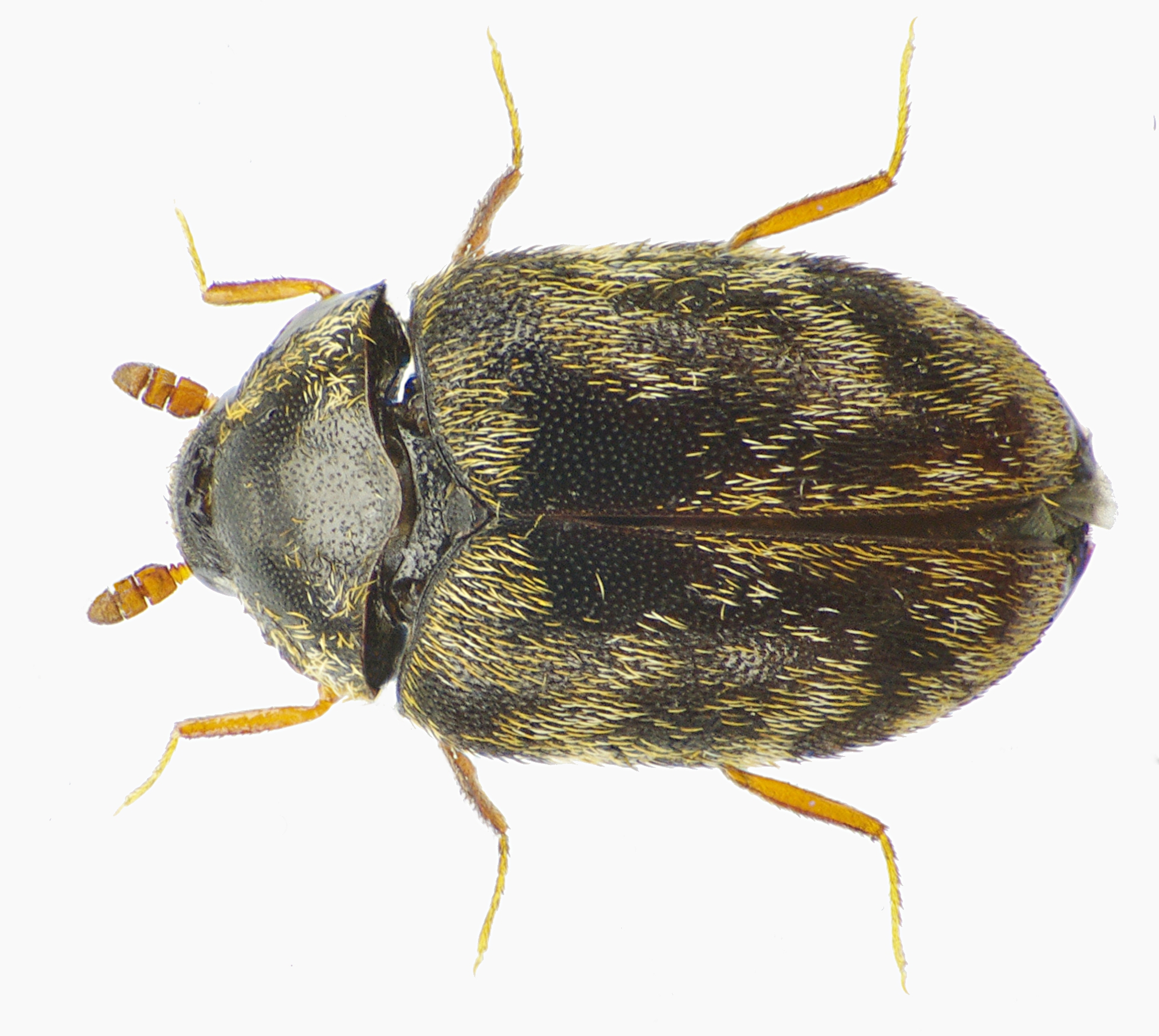 Anthrenocerus australis aus Süddeutschland, Spaichingen,Anfang Oktober im Haus, Aufsicht